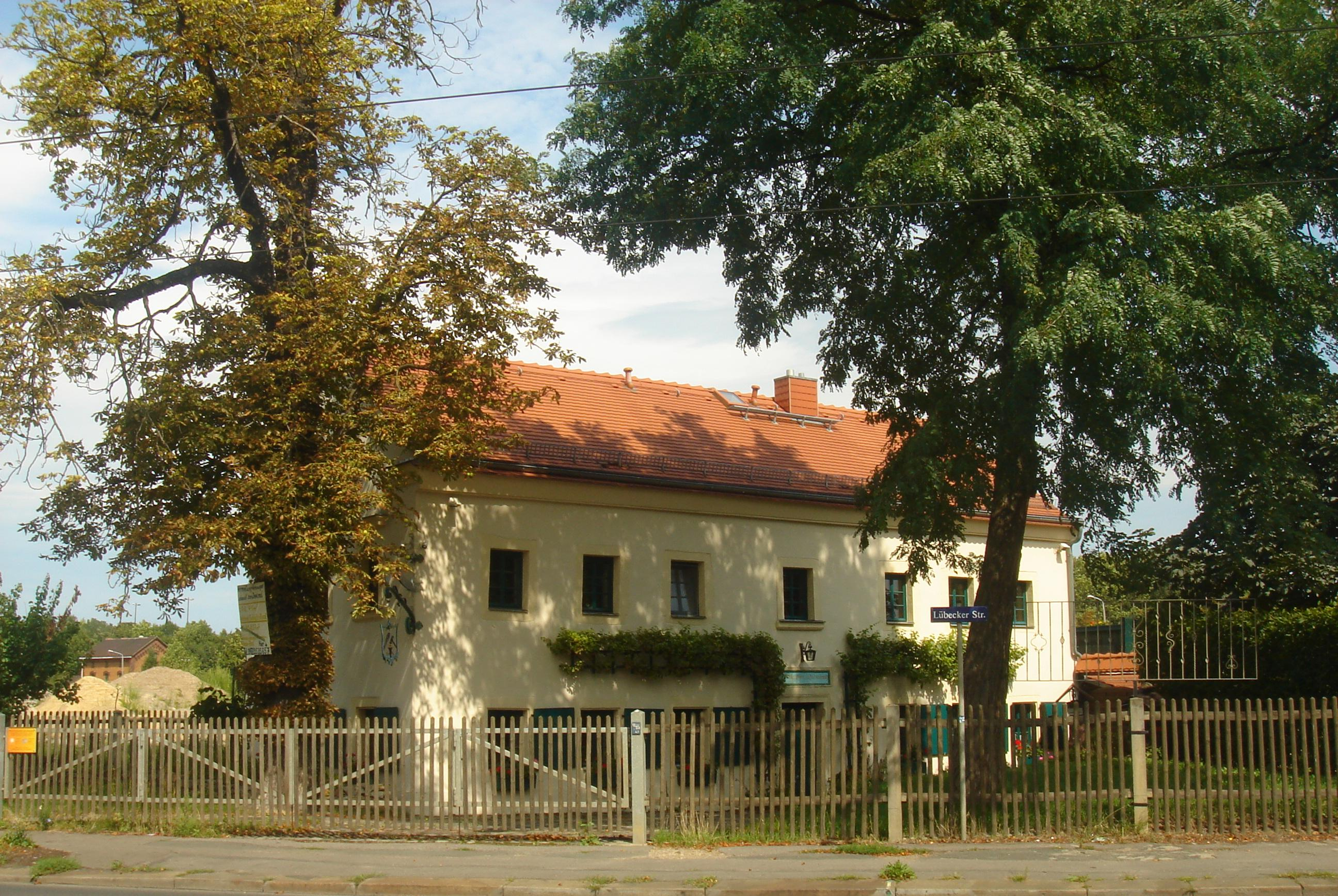 Blick auf ein altes Cottaer Wohngebäude an der Lübecker Straße schräg gegenüber dem Rathaus